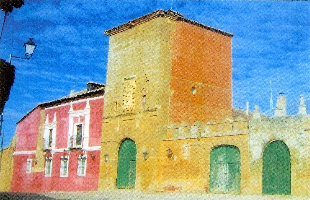 Fachada del Palacio de los Osorio en Valdunquillo